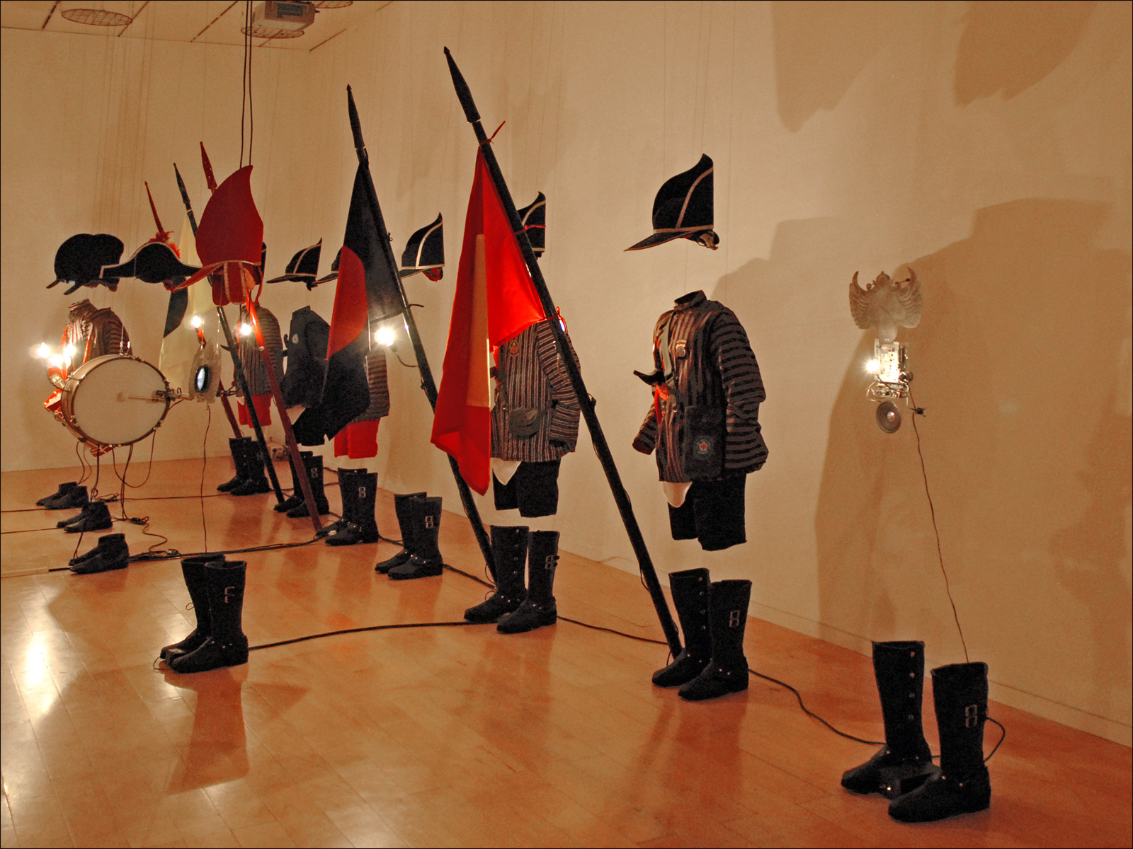 Java's Machine : Phantasmagoria 2008 Jompet Kuswidananto (1976, Yogyakarta, Indonésie) (oeuvre également sonore) Musée d'art contemporain Xe Biennale de Lyon